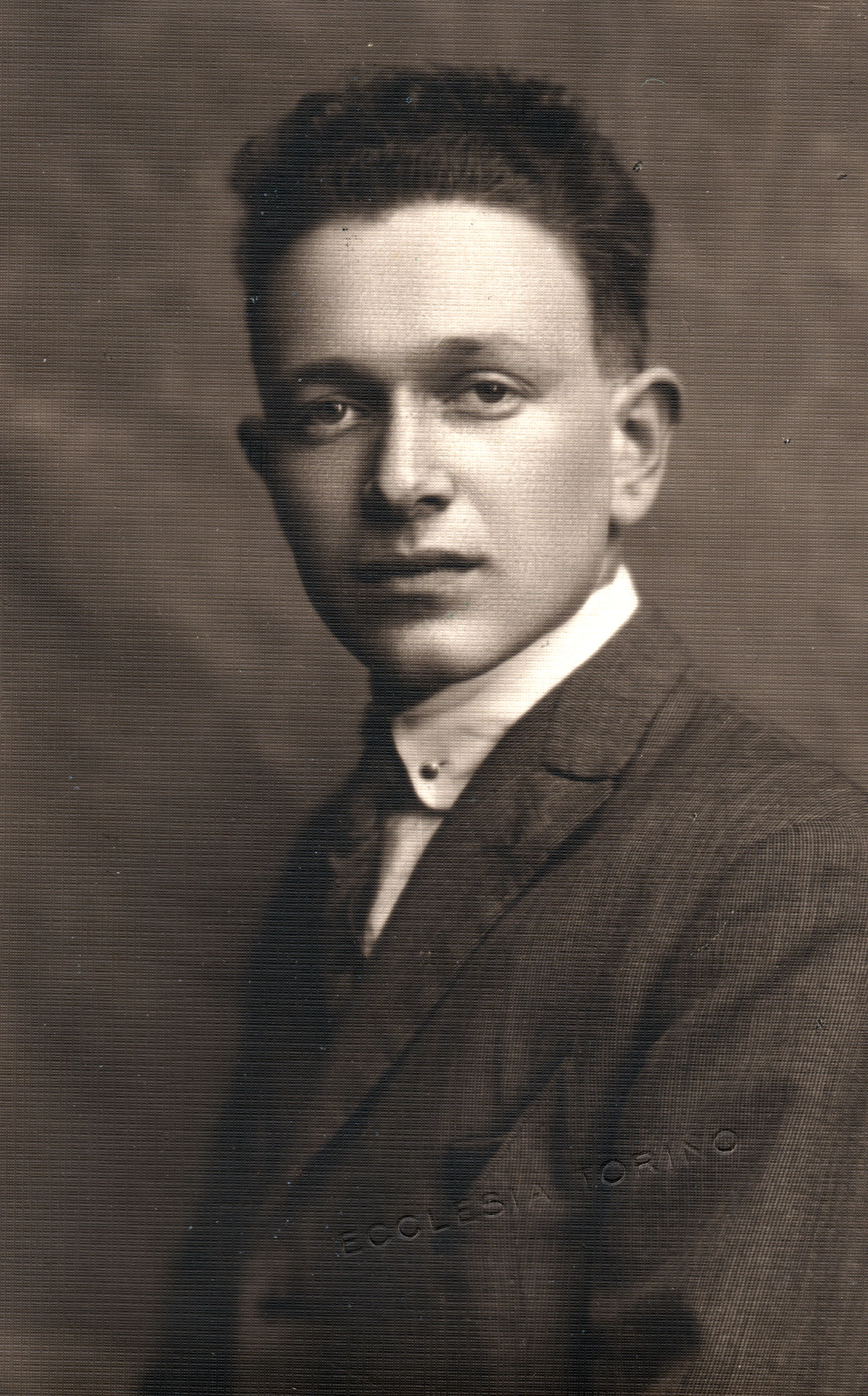 Ritratto di Rinaldo De Benedetti